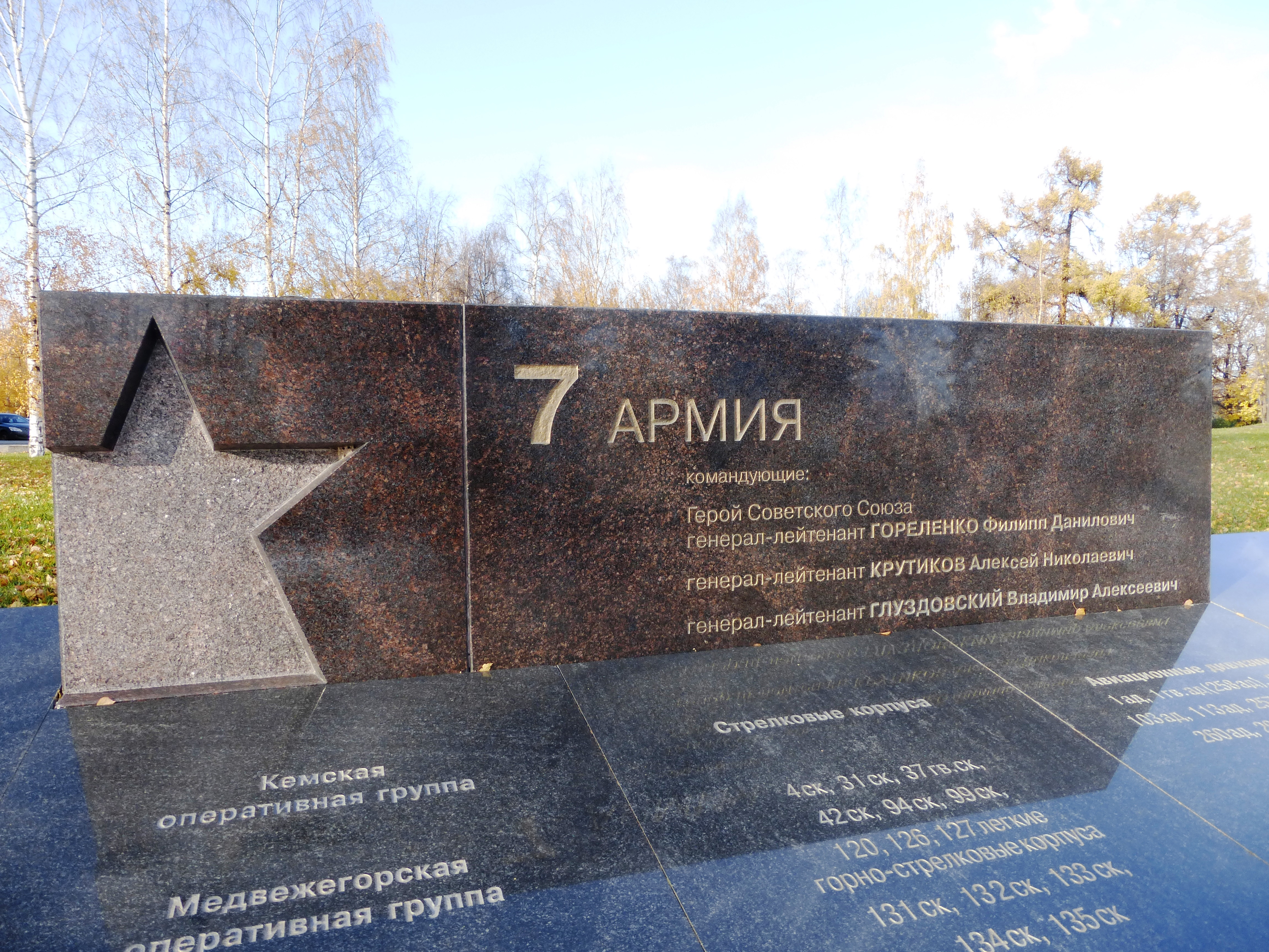 Фрагмент военно-мемориального комплекса Карельского фронта «Аллея памяти и славы» в Петрозаводске